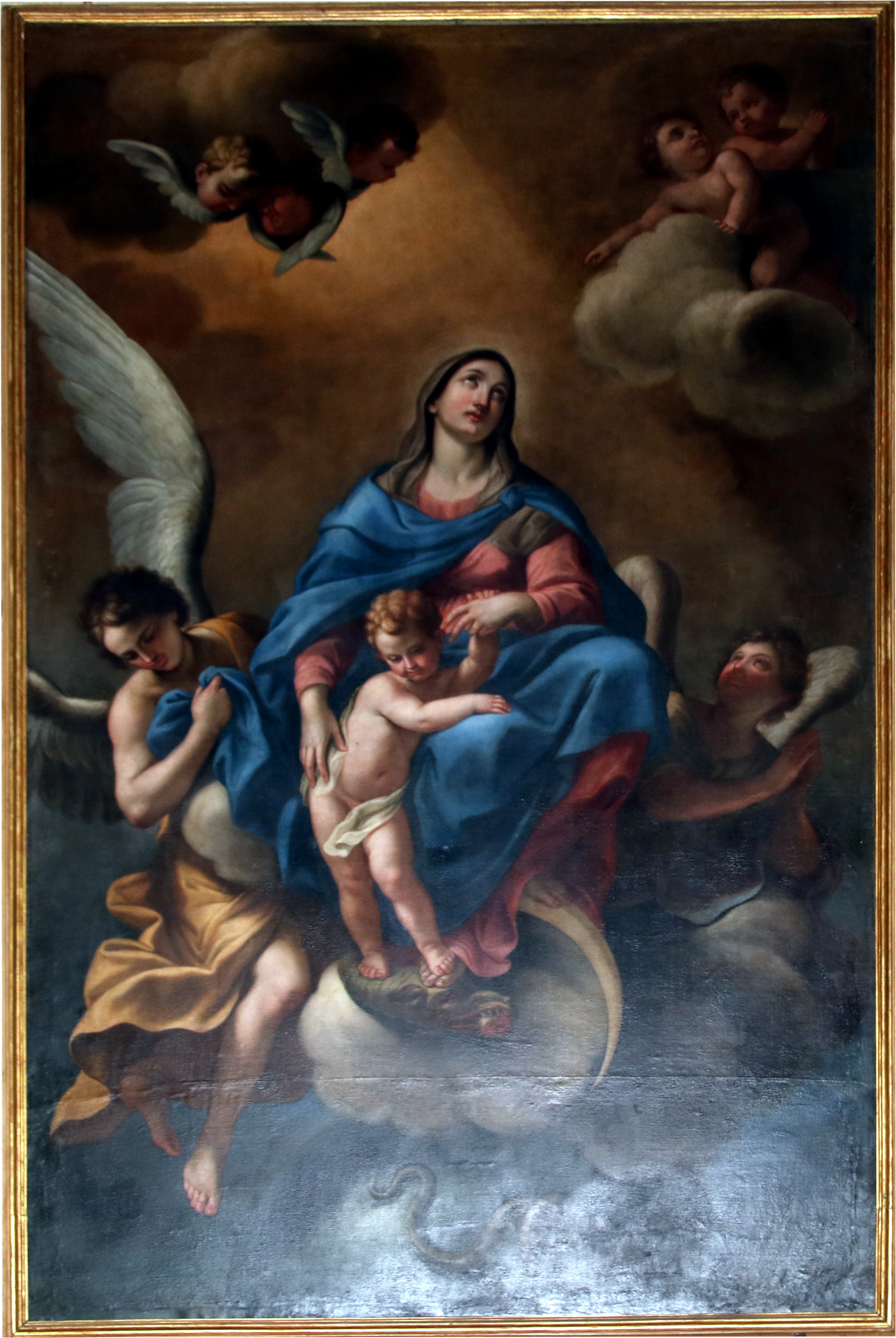 basilica di Santa Maria di Campagna This is a photo of a monument which is part of cultural heritage of Italy.